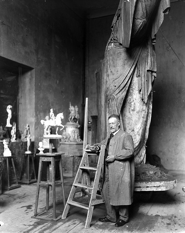 Bildhuggare John Börjeson i ateljén på Sergelgatan